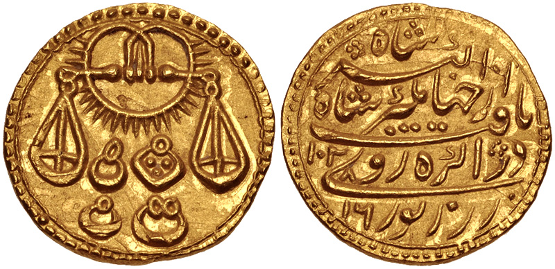 سکه مهور نورالدین محمد جهانگیر شاه مغول